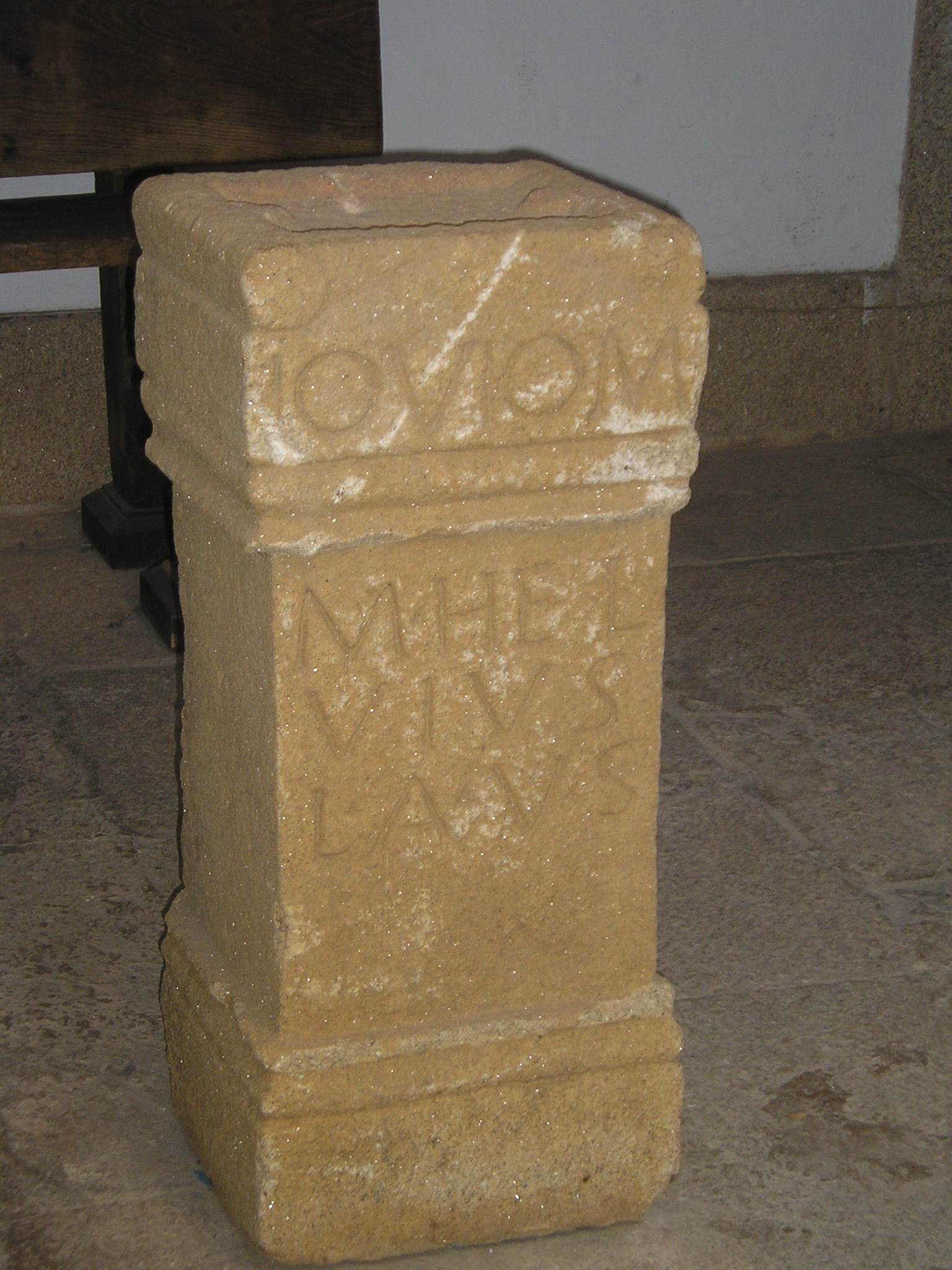 Ara votiva dedicada a Júpiter procedente de Abertura (Cáceres) en el territorium de la Colonia Norba Caesarina, correspondiente a la inscripción AE 2002, 703, cuyo texto se desarrolla como: IOVI O(ptimo) M(aximo)/ M(arcus) HEL/VIVS/ L(ibens) A(nimo) V(otum) S(olvit)